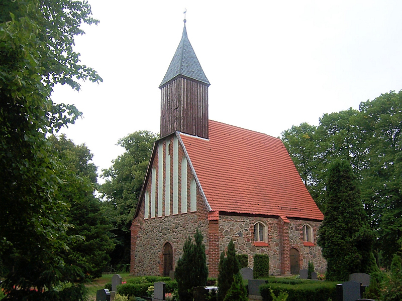 Kirche in Damm, Landkreis Parchim